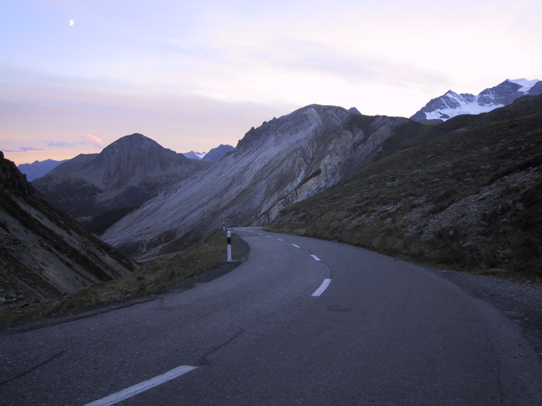 Versante svizzero del valico "Forcola di Livigno"